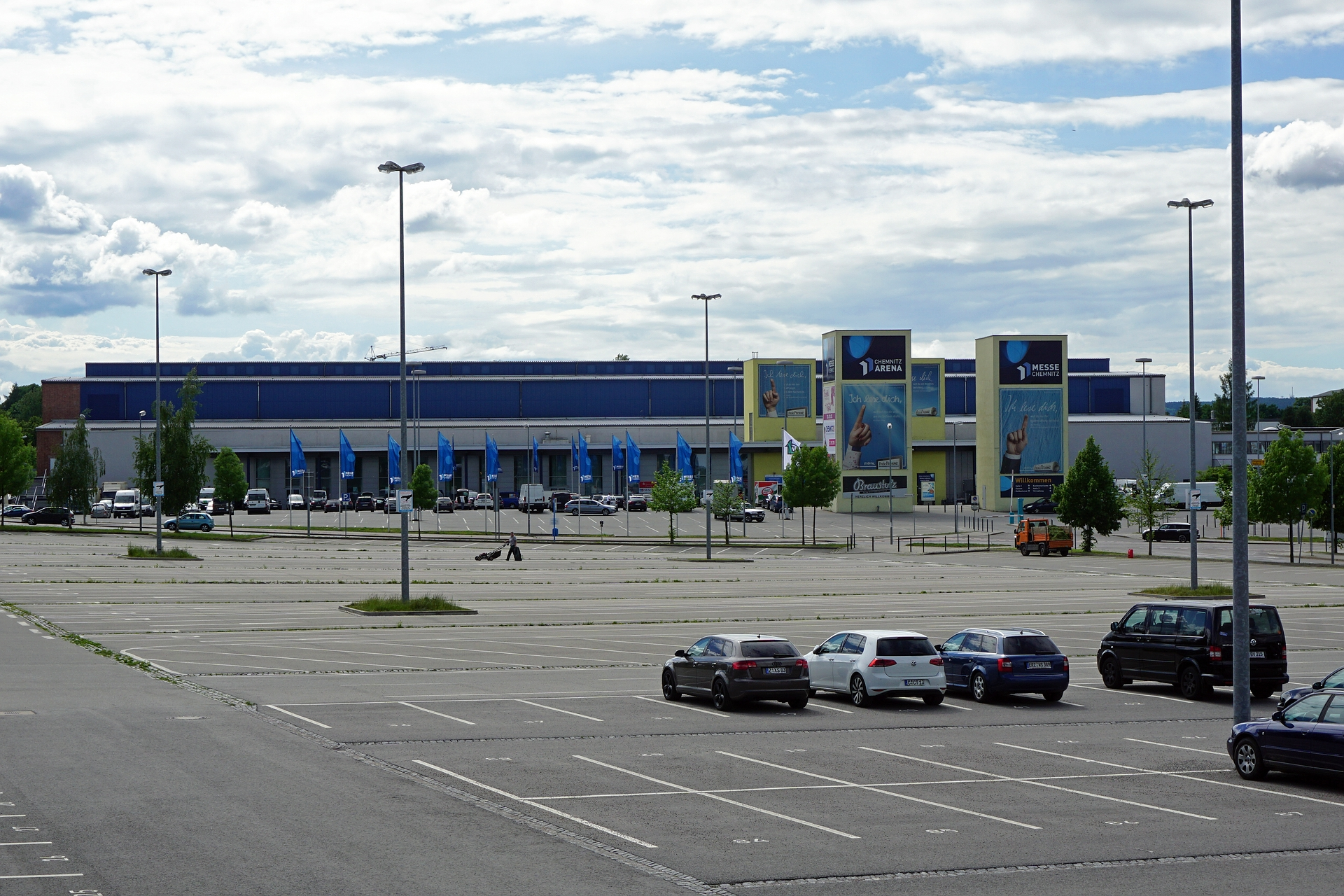 Blick zur Chemnitz-Arena, 2016